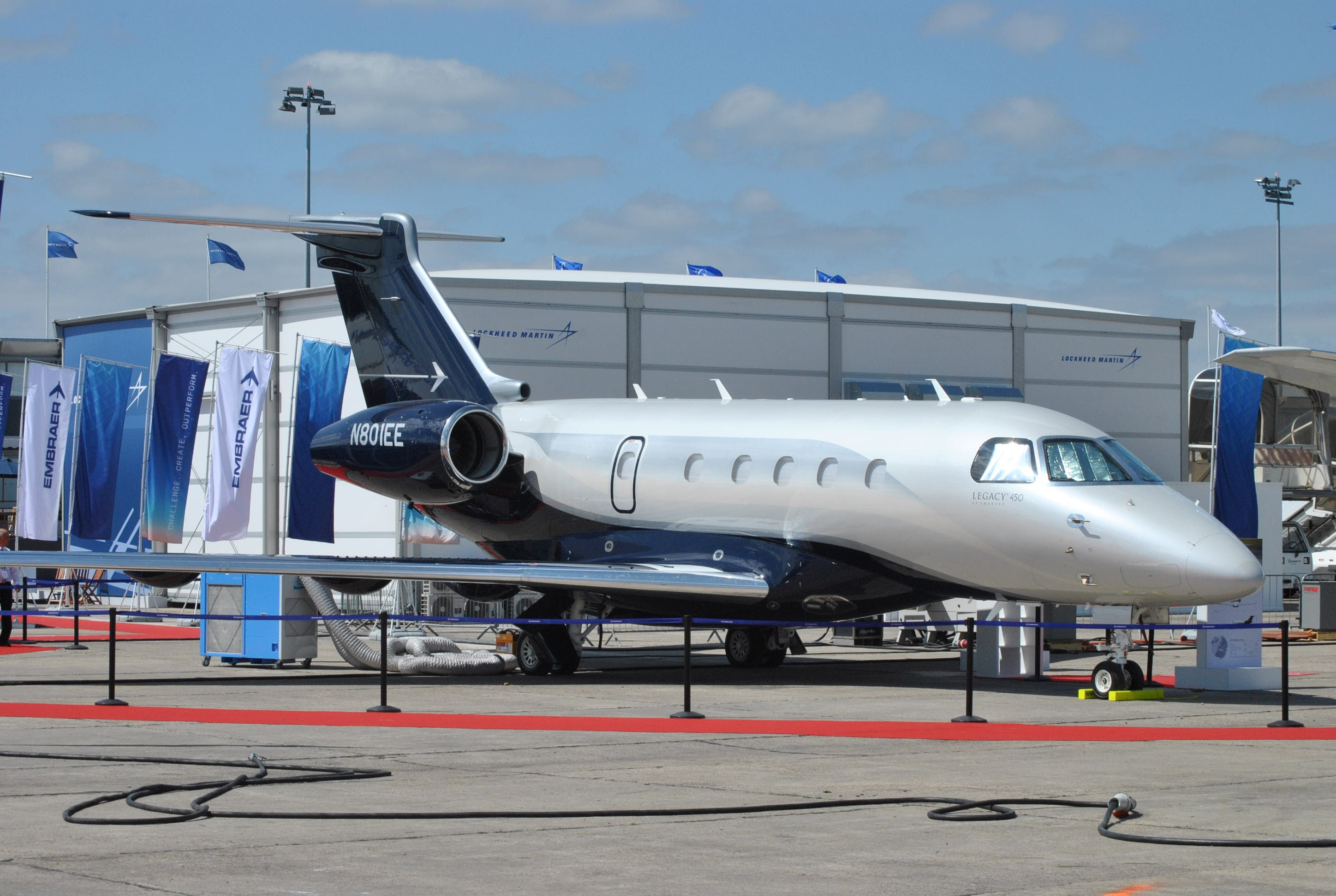 Paris Air Show 2017 Embraer Legacy 450